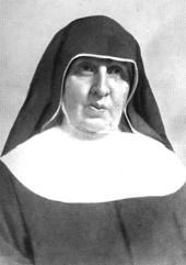 Mutter Ignatia (Anna) von Hertling (1838-1909), Kapuziner-Klarissin, Klostergründerin in Koblenz, Cousine des deutschen Reichskanzlers Georg von Hertling